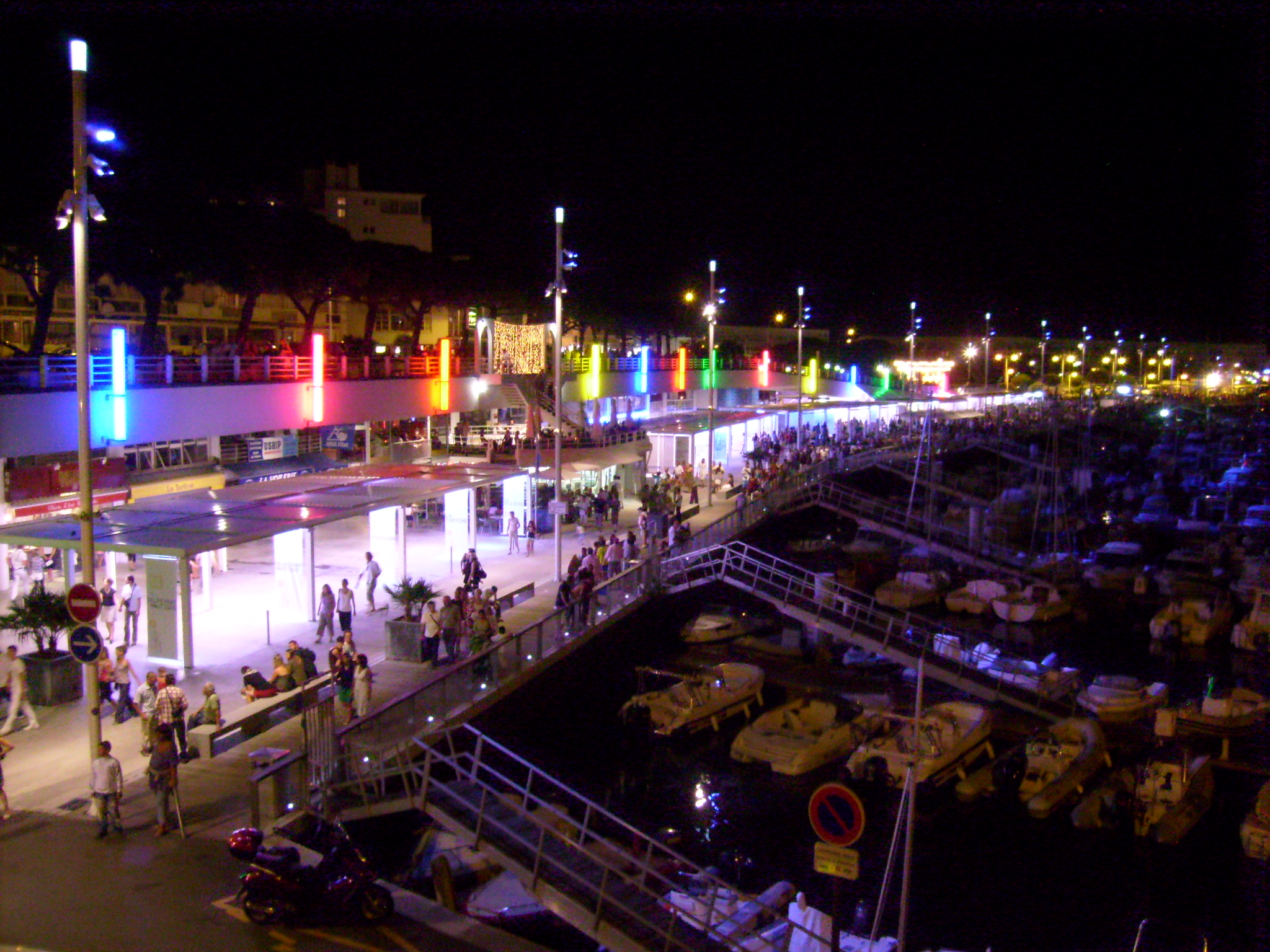 Le port de Royan la nuit. Photo prise le soir du 15 août, aux alentours de 1 h du matin, peu après le spectacle pyrosymphonique.